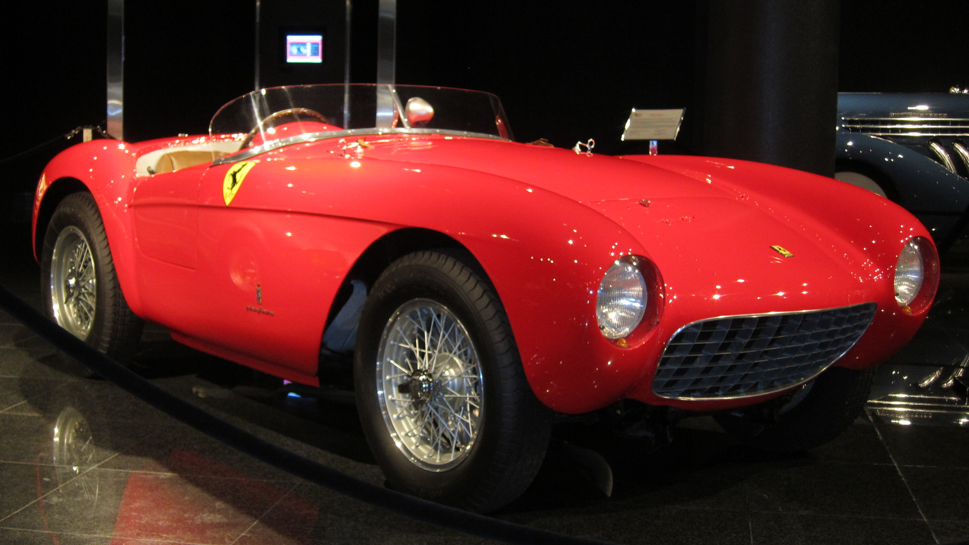 Ferrari 500 Mondial Pinin Farina Spyder del 1954. This may be serial number 0434MD, which has been in the Blackhawk collection.[1]